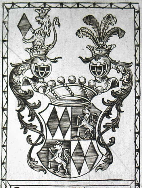 Wappen der pfalz-bayerischen Adelsfamilie der Freiherrn von Stengel (1780)